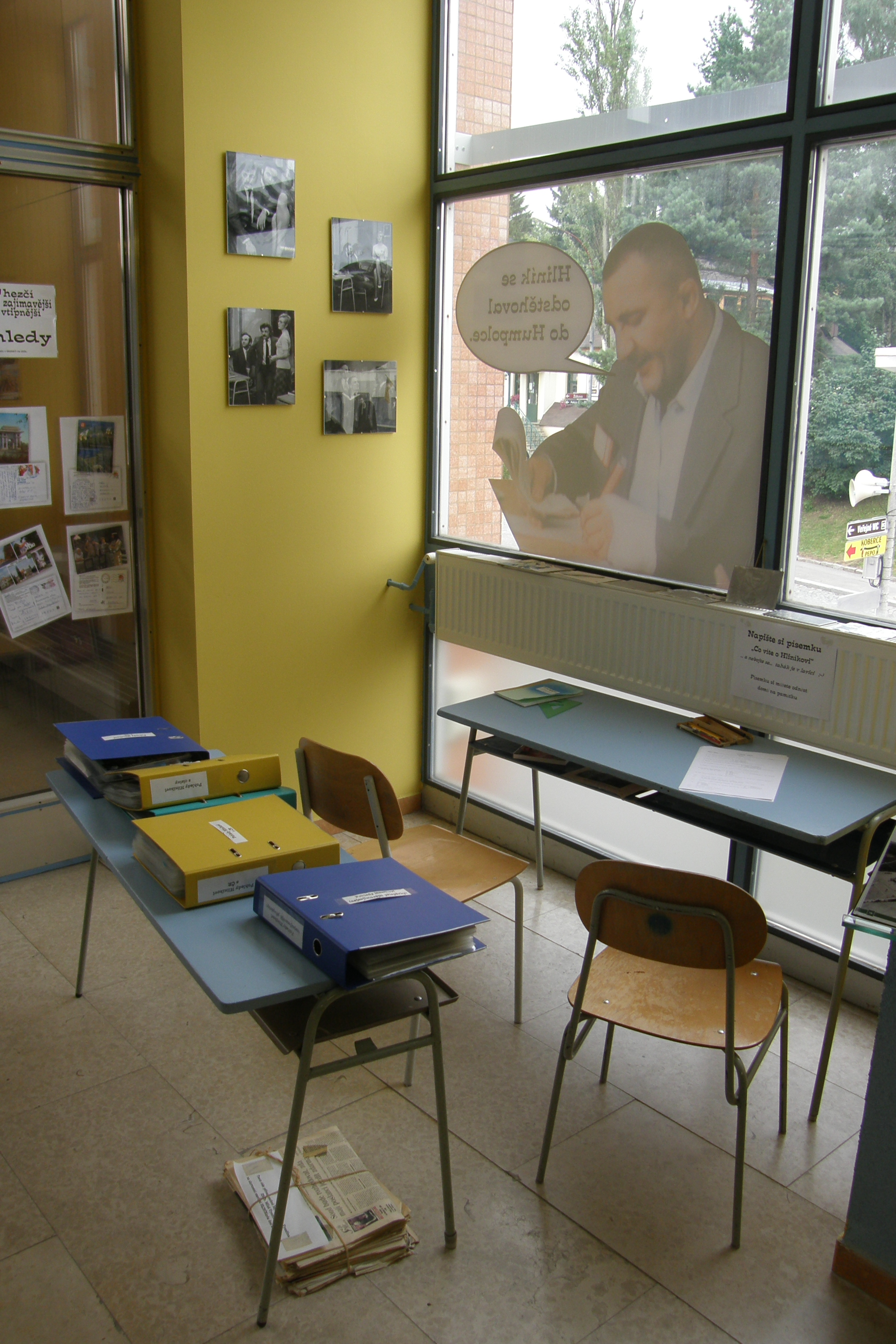 Muzeum HLINÍKárium v Humpolci